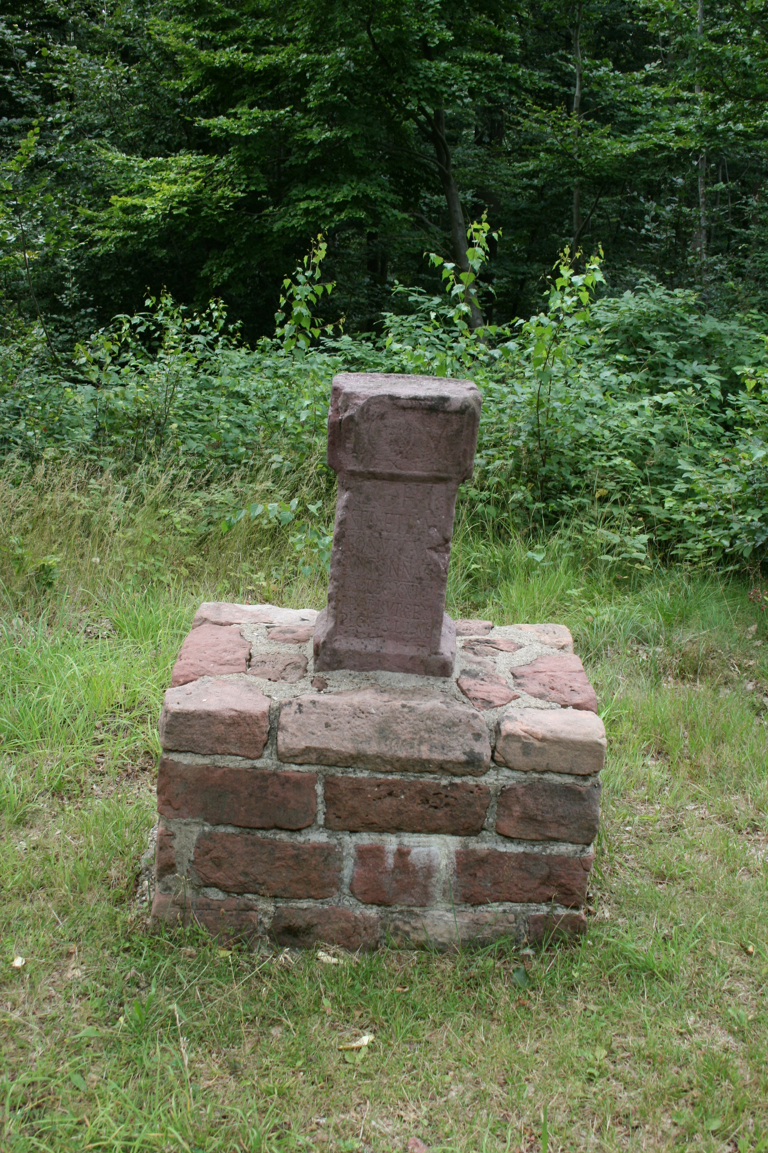 Limesturm Wp 10/37 "In der Schneidershecke" bei Schloßau. Replik der Bauinschrift am Turm (CIL XIII, 06509). (der ganze Sockel hat tatsächlich ziemlich Schlagseite!)